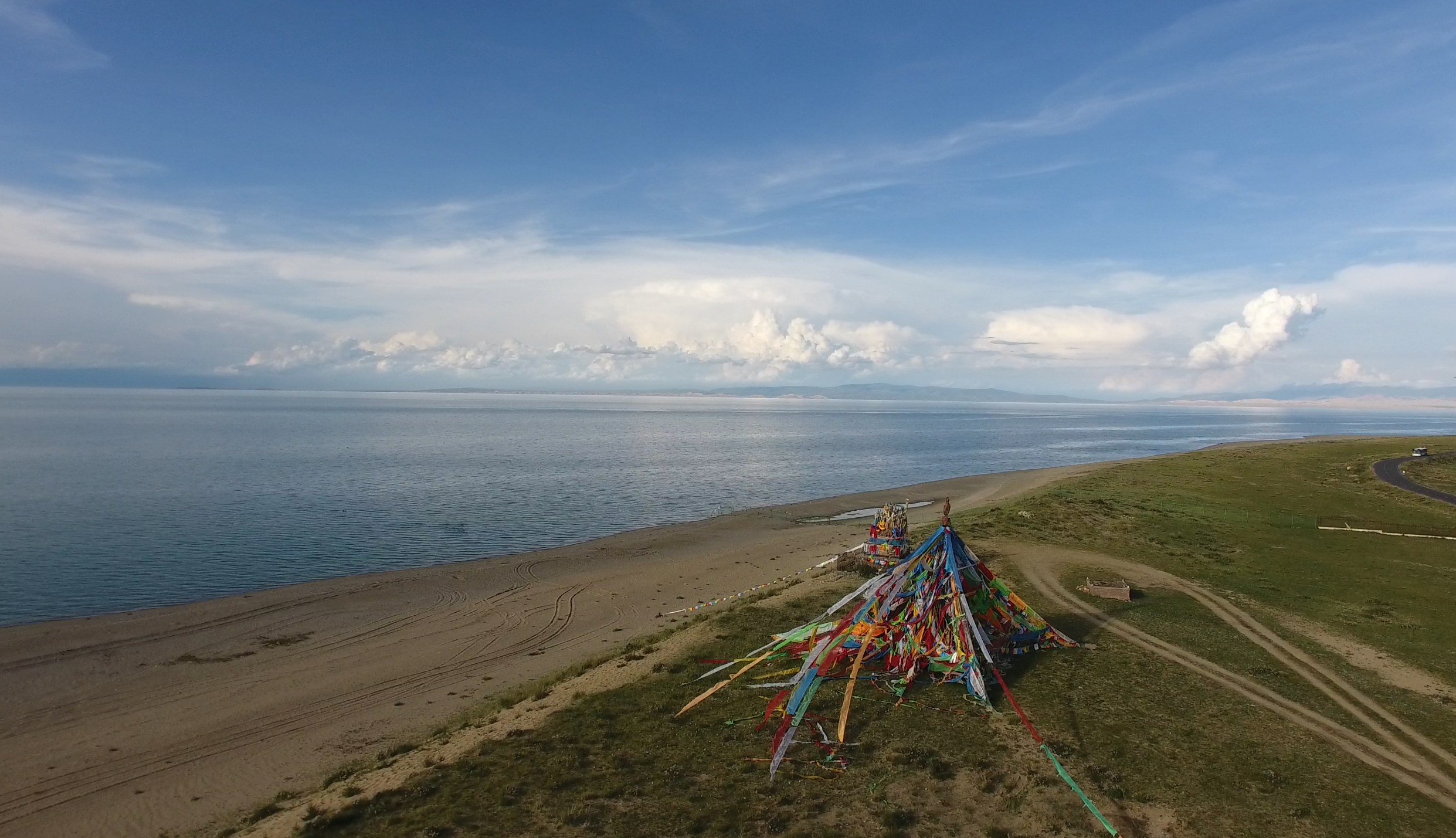 青海湖二郎剑沙洲附近